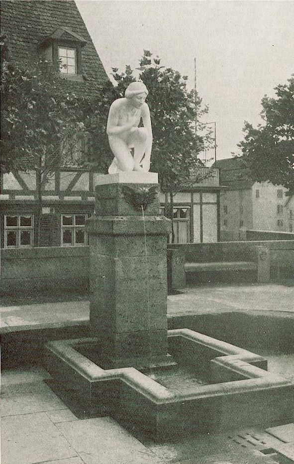 Tübingen. Nymphenbrunnen vor der Neckarmüllerei, auf dem Platz an der Ecke der Gartenstraße und der Zufahrt zur Neckarbrücke (Eberhardsbrücke), der 1909/1910 nach den Plänen des Architekten Theodor Fischer umgestaltet wurde.Skulptur einer Nymphe von Bildhauer Karl Merz (1869–1950) wurde als Abschluss der Arbeiten im Sommer 1910 aufgestellt.Der Brunnen wurde mit dem Wasser des Lützelbrunnens gespeist. Die Skulptur aus weißem toskanischen Marmor wurde beim Abriss der Neckarmüllerei 1961 abgebaut und im Park am hinteren Anlagensee auf einem neuen Podest aufgestellt.